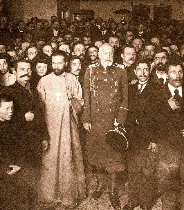 Священник Георгий Гапон и градоначальник Иван Фуллон на открытии Коломенского отдела "Собрания Русских фабрично-заводских рабочих г. Санкт-Петербурга"